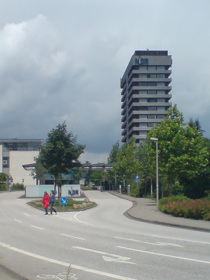 Hochhaus des NDR-Fernsehens in Hamburg-Lokstedt. Cropped from Image:NDR Lokstedt.jpg